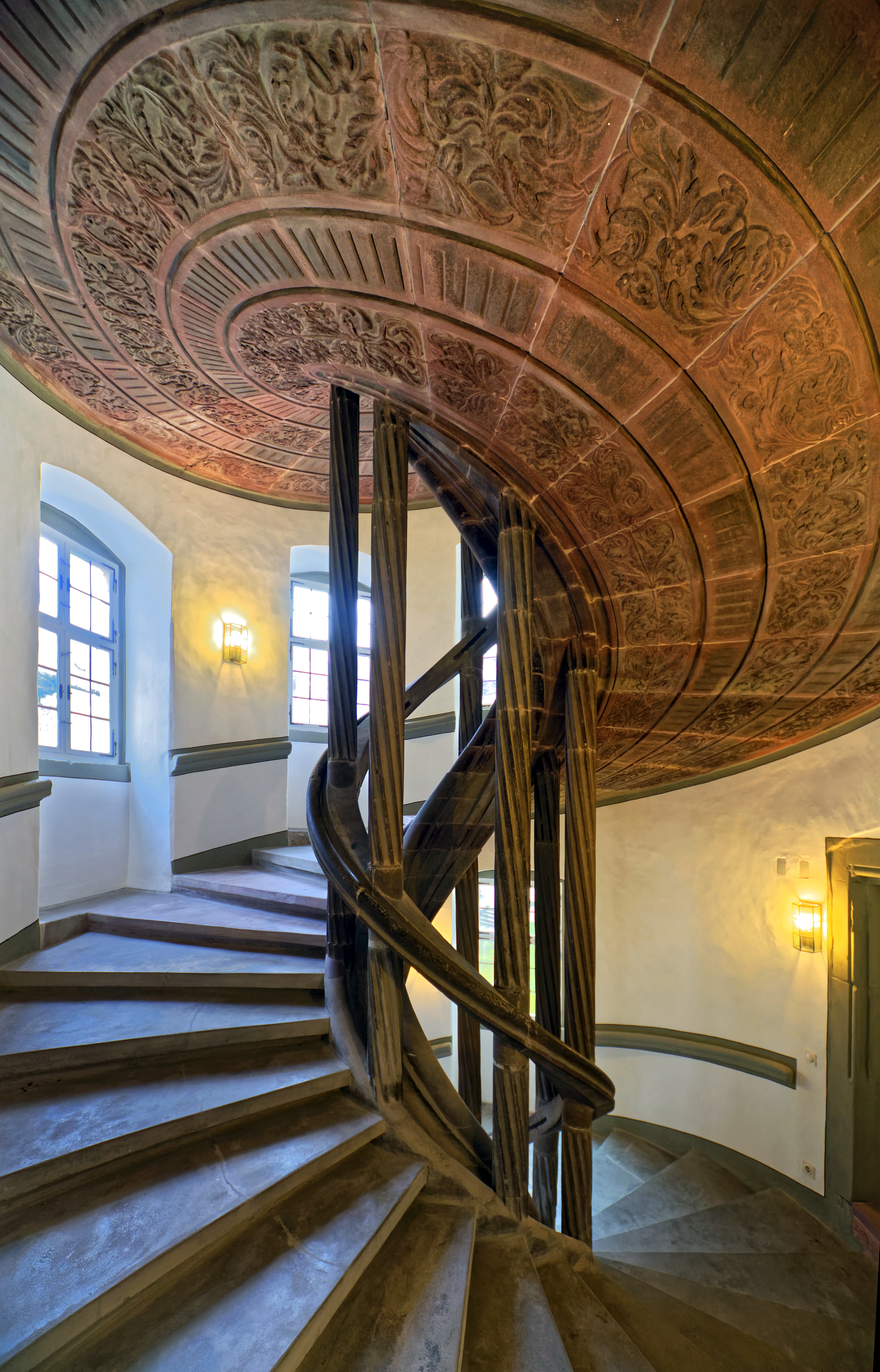 Die Berwarttreppe im Deutschordensschloss Bad Mergentheim.